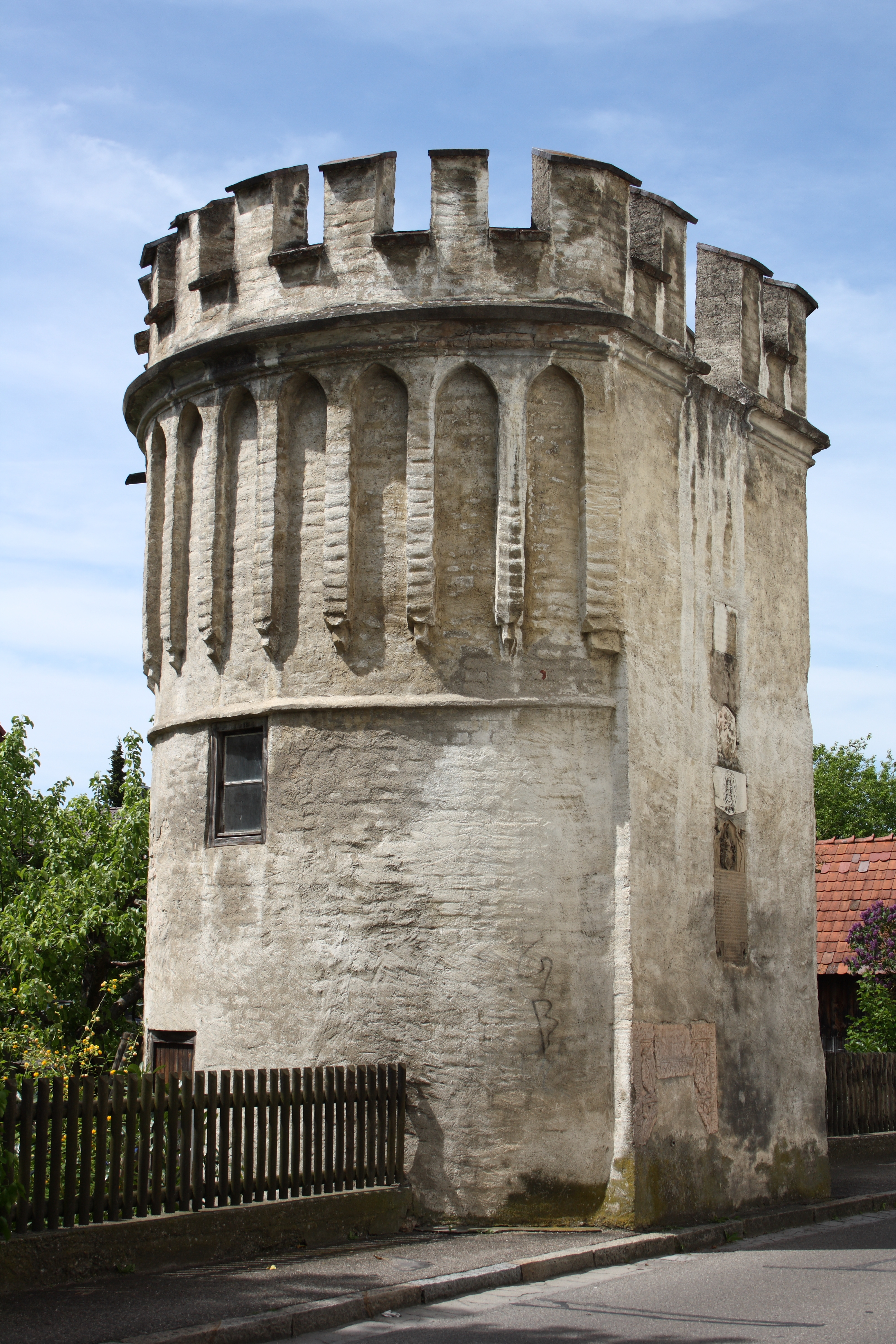 Mauerturm der Stadtbefestigung in Lauingen im Landkreis Dillingen an der Donau (Bayern) am Oberanger, hinter der Stadtpfarrkirche St. Martin